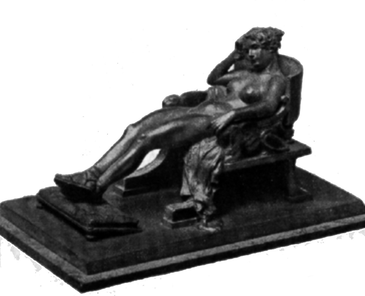 "Siesta" von Martin Schauß, Bildhauer in Berlin. Gezeigt auf der Großen Berliner Kunstausstellung 1899.